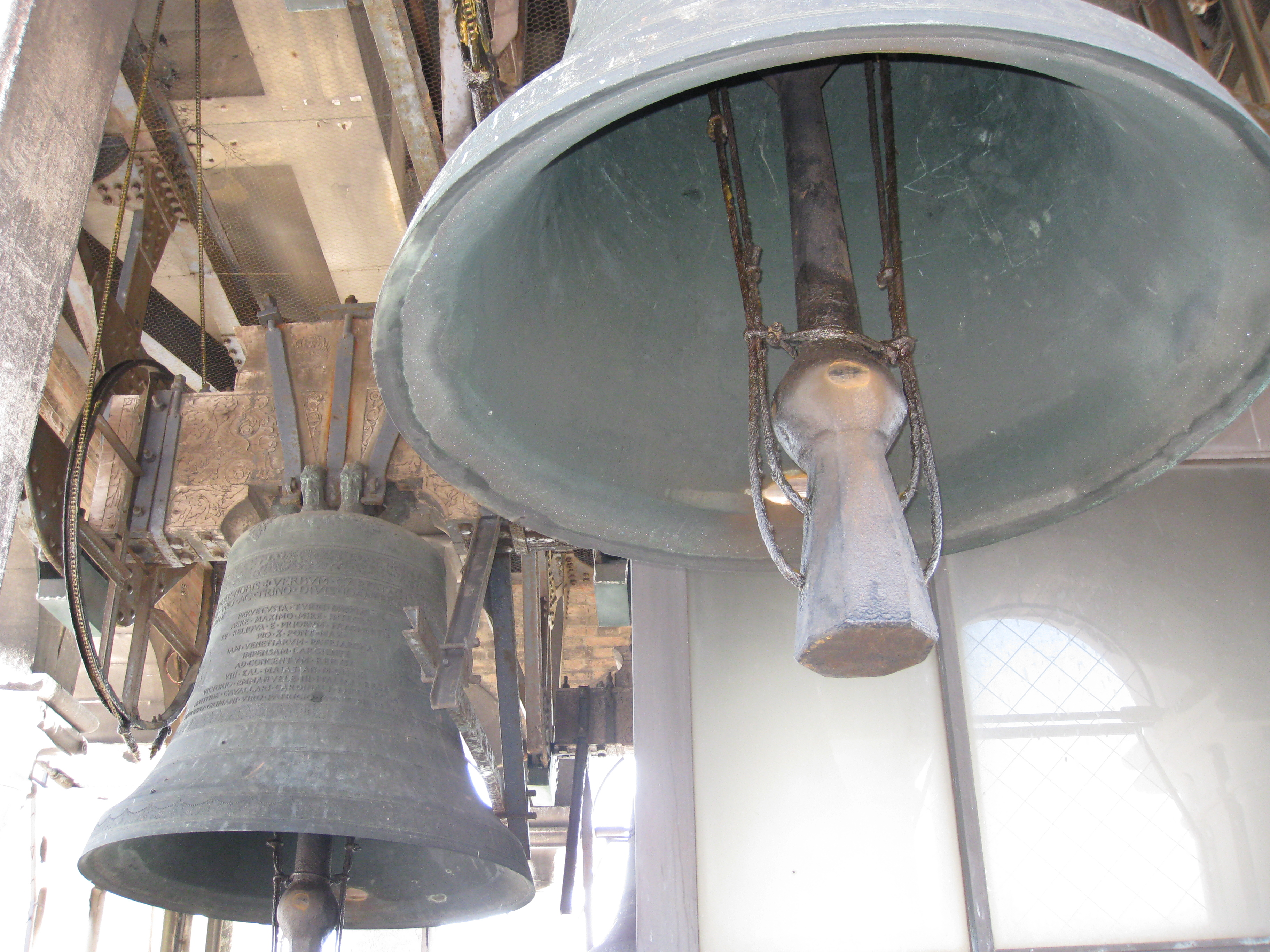 View from the Campanile of St. Marks Basilica הנוף הנשקף ממגדל הפעמונים של כנסיית סנט מרקס